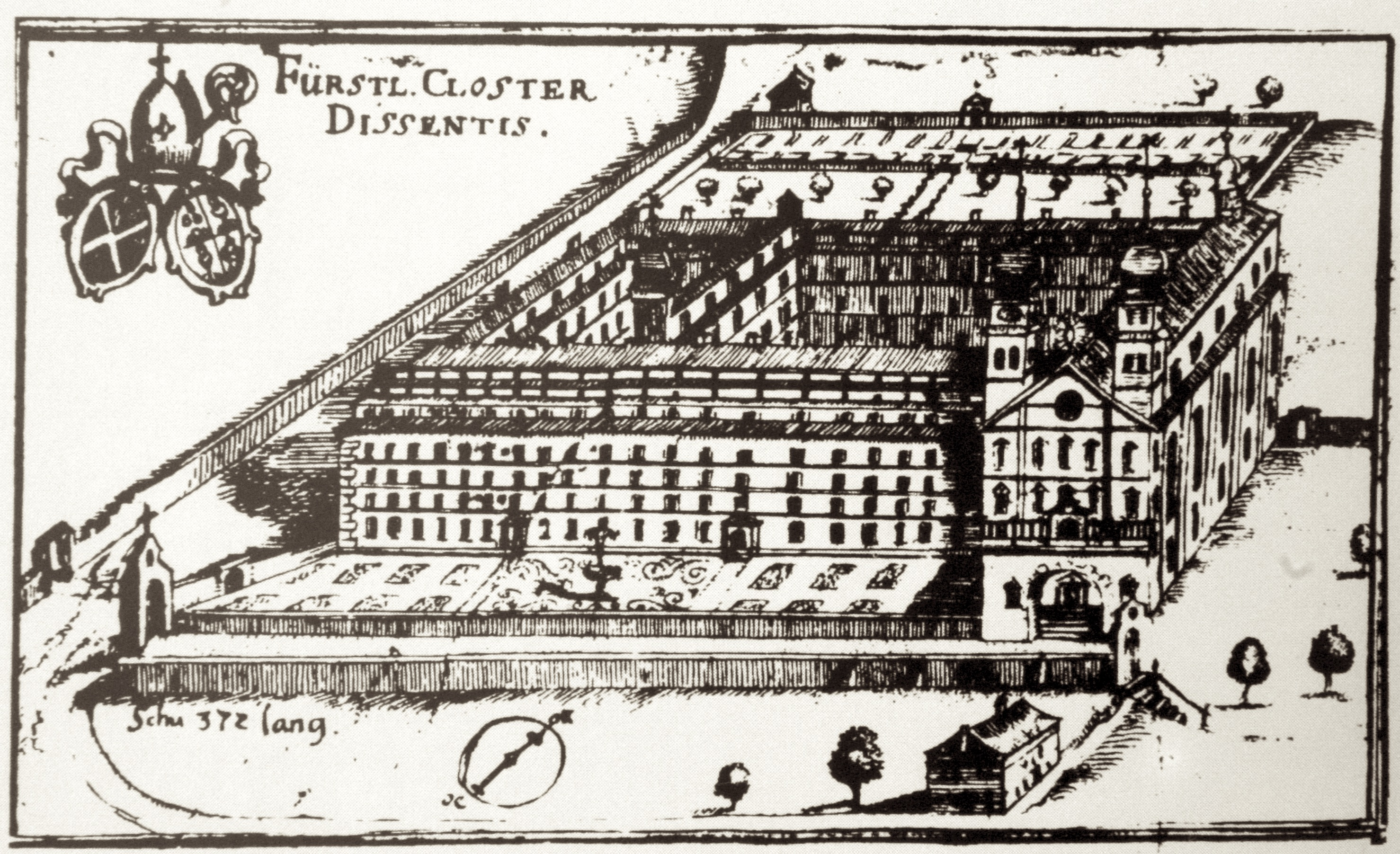 Kloster Disentis 1698 aus der Schweizerkarte von Heinrich Ludwig Muoss, 1698